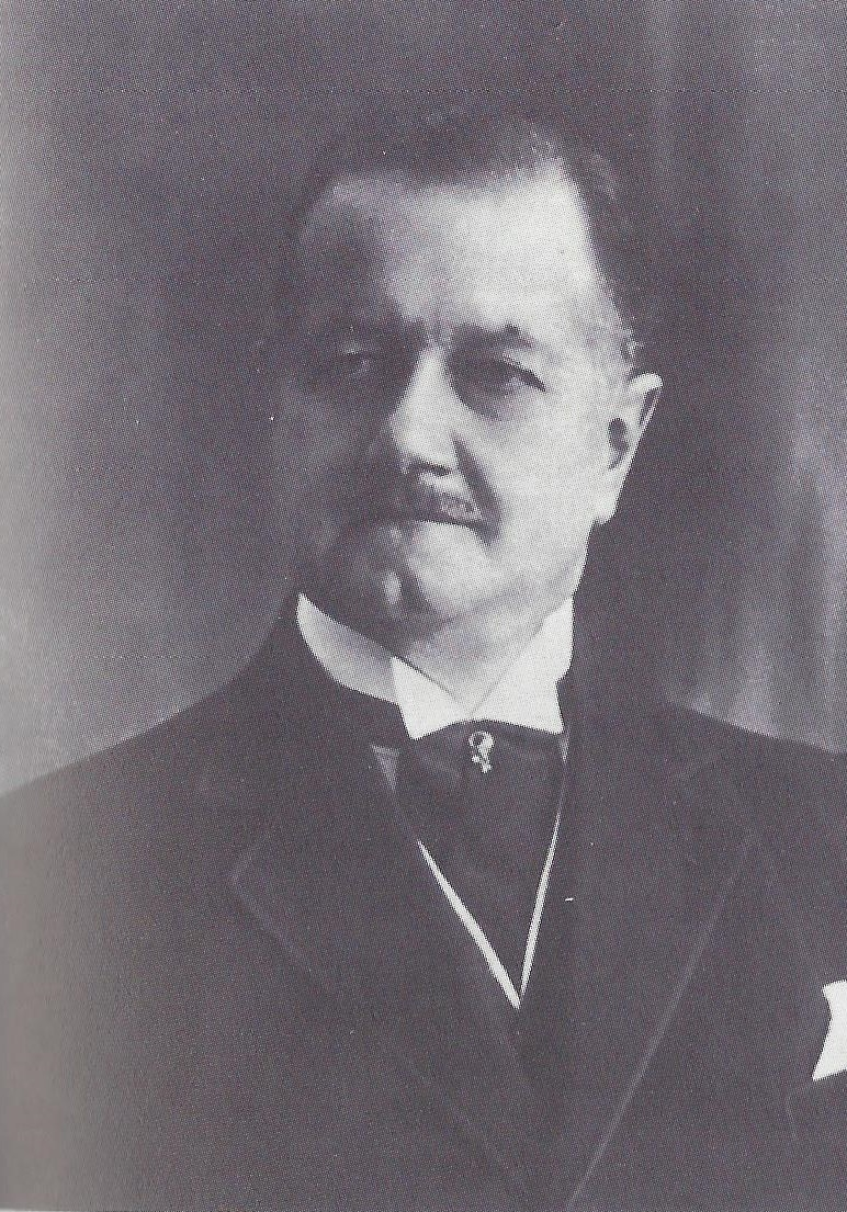 Porträtfotografie des Schweizer Orthopäden Placide Nicod (1876–1953)